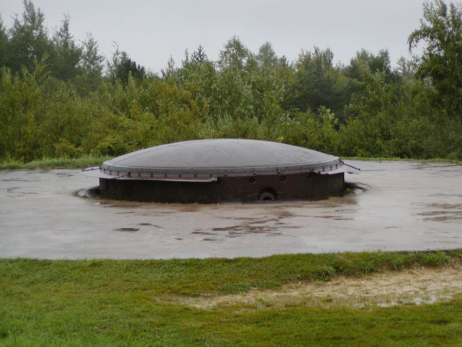 Artillery defenses